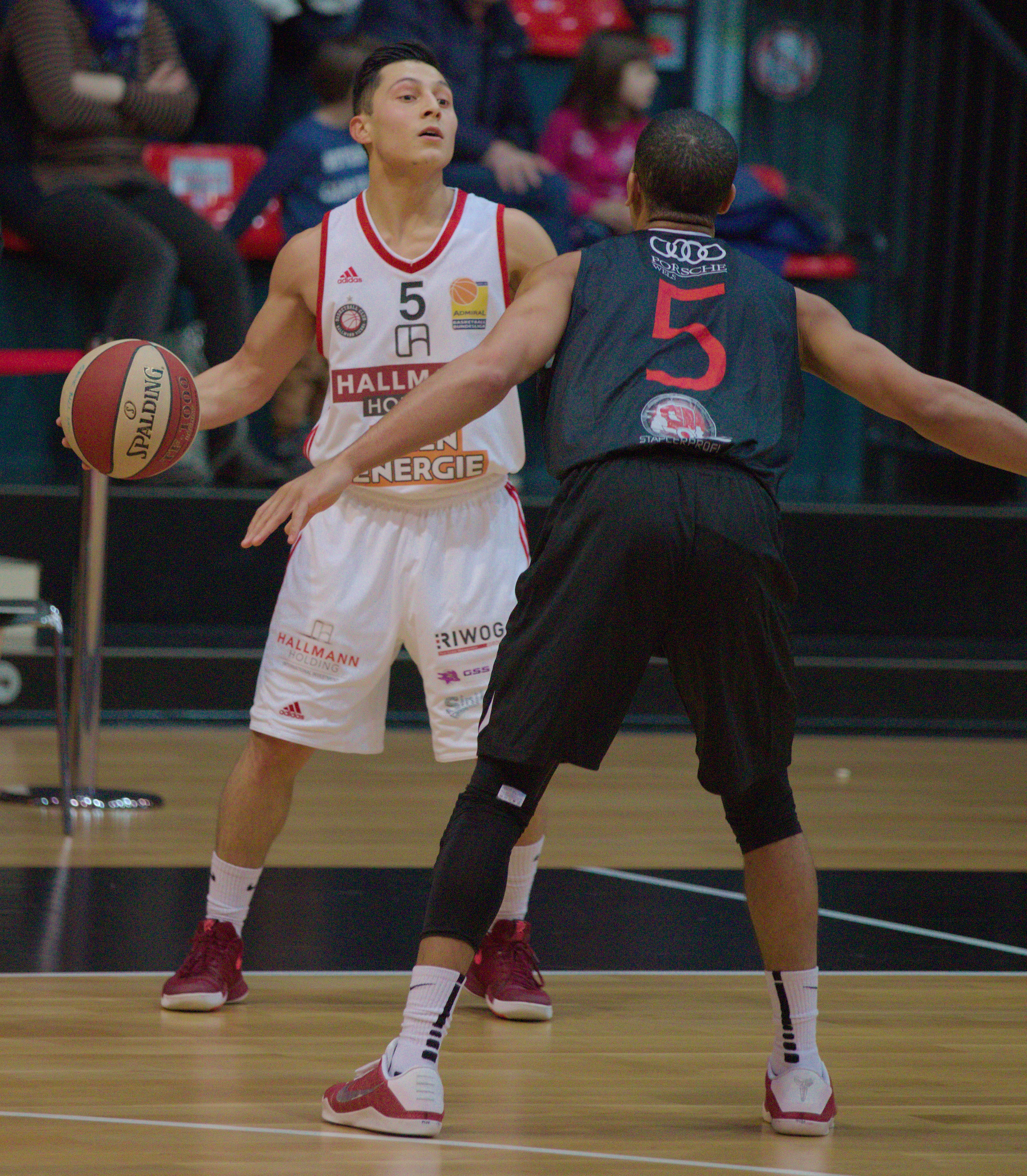 Mustafa Hassan Zadeh (links), Spieler beim BC Vienna, und Siyani Chambers von den Raiffeisen Flyers Wels, während des Basketball-Bundesligaspiels am 21. Jänner 2018